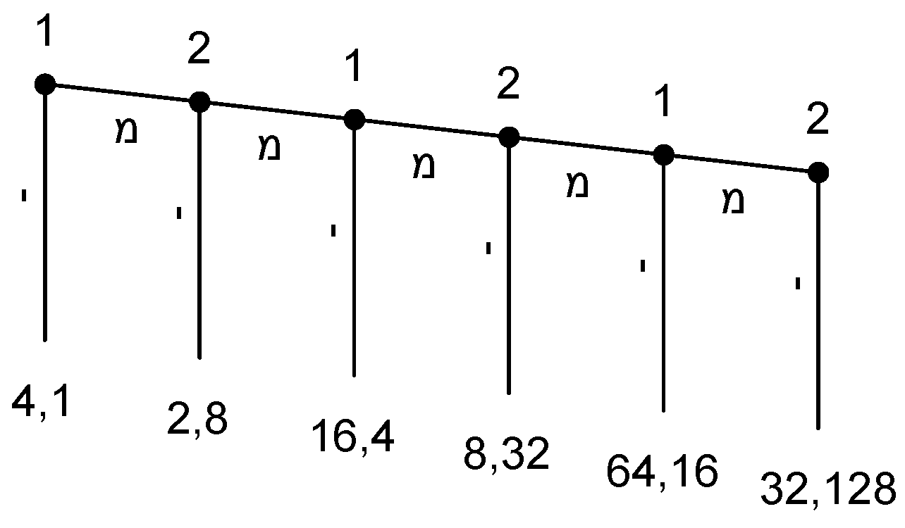 תמונה מייצור עצמי